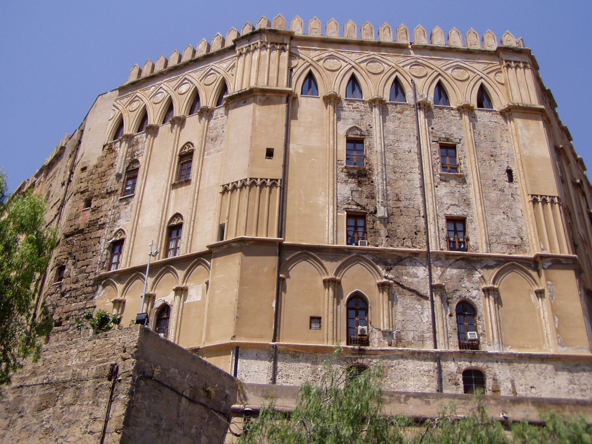 View of Palazzo dei Normanni in Palermo.